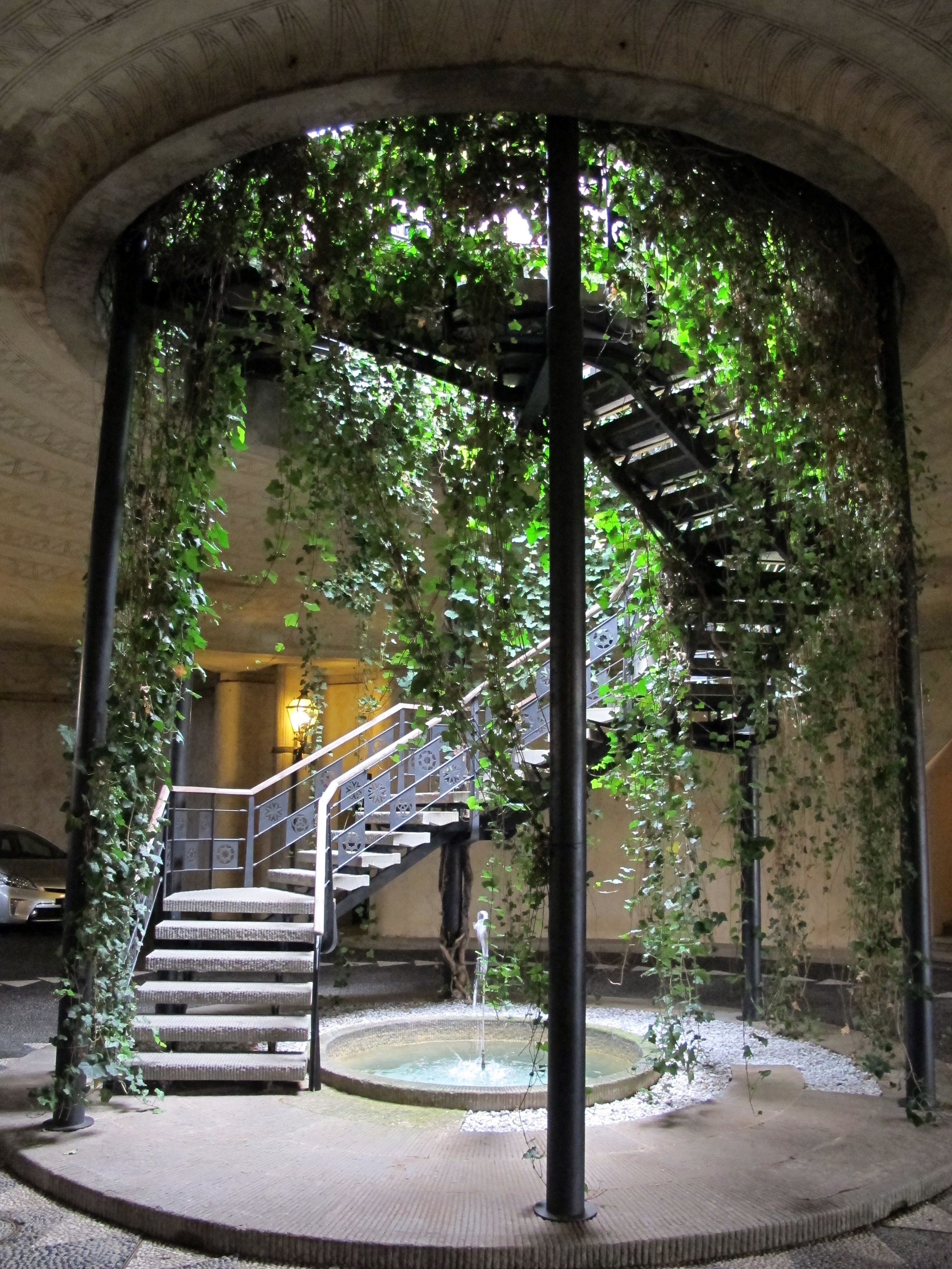 Villa Il Roseto (Firenze)